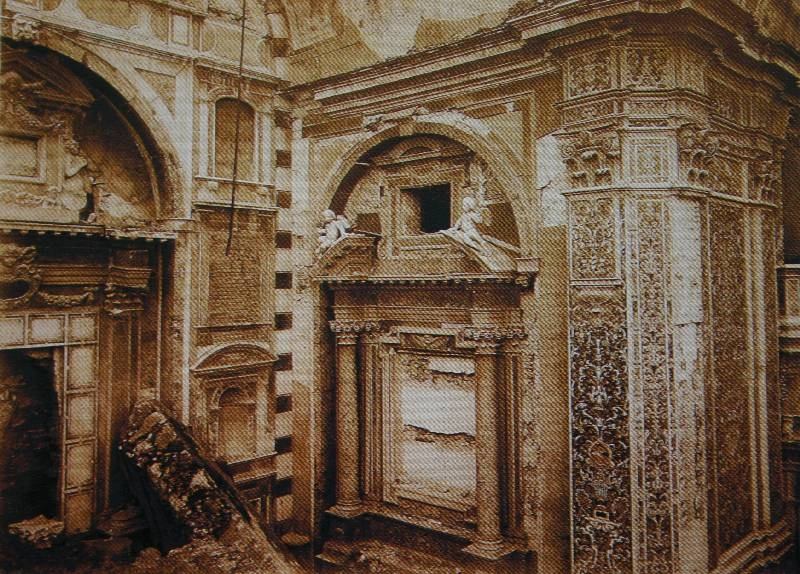 Le rovine della Chiesa di San Gregorio a Messina, che era stata progettata nel 1702 da Filippo Juvarra, dopo il terremoto del 1908.